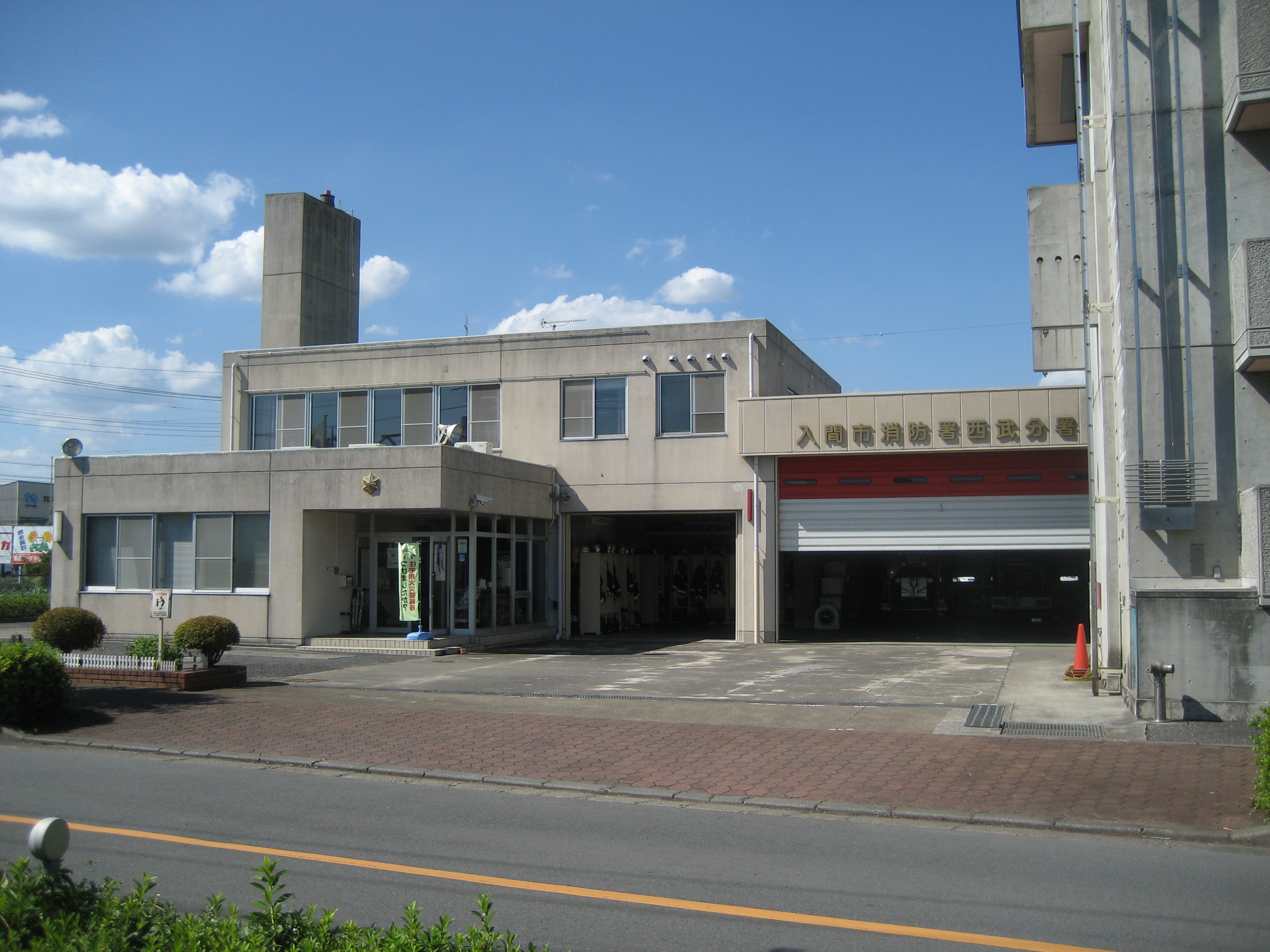 入間市消防本部消防署西武分署